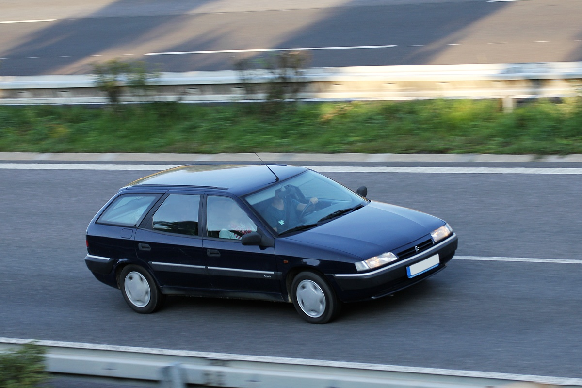 Citroën Xantia Break